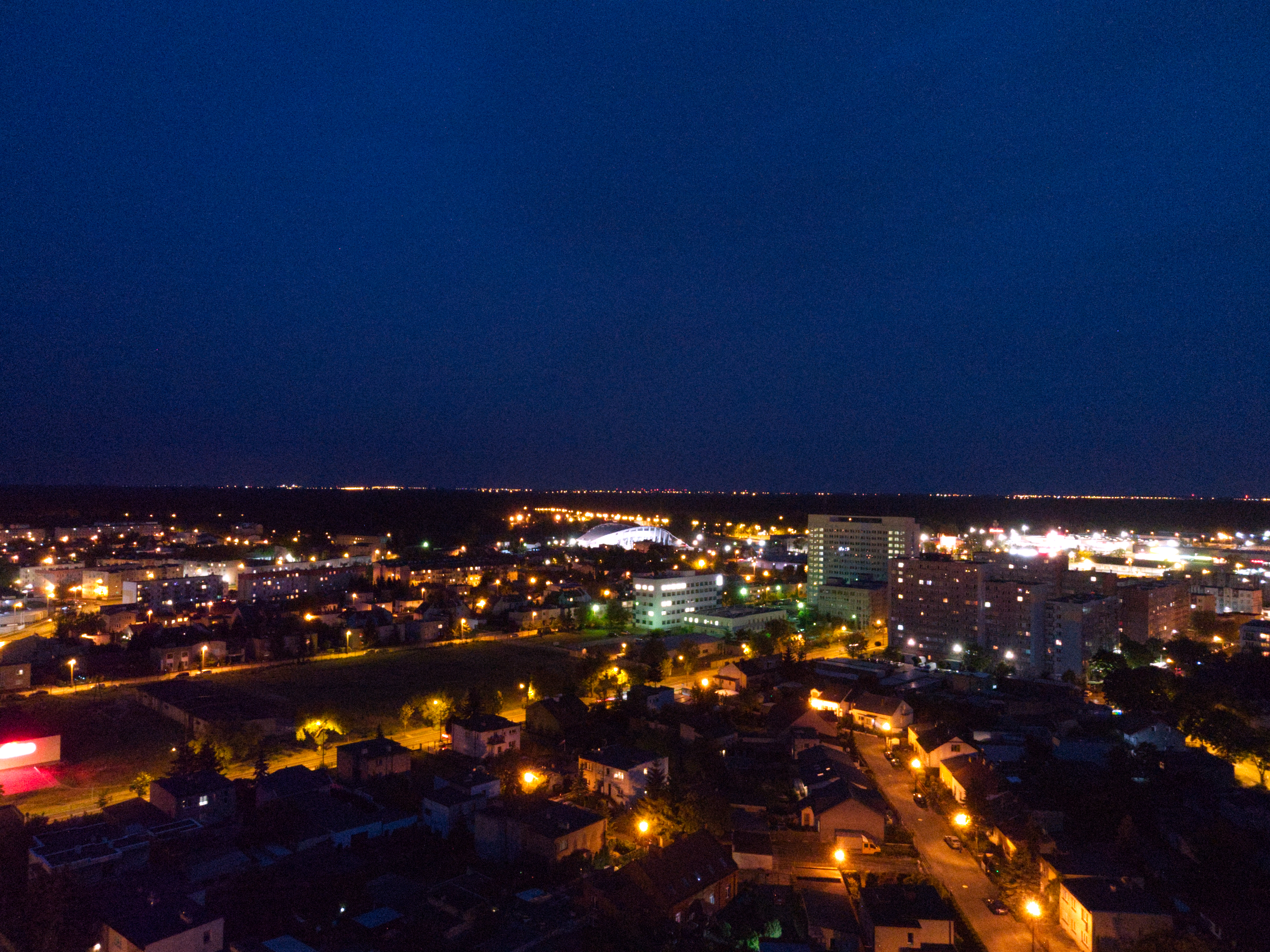 Styk Kazimierza Wielkiego i Śródmieścia (2020 r.)